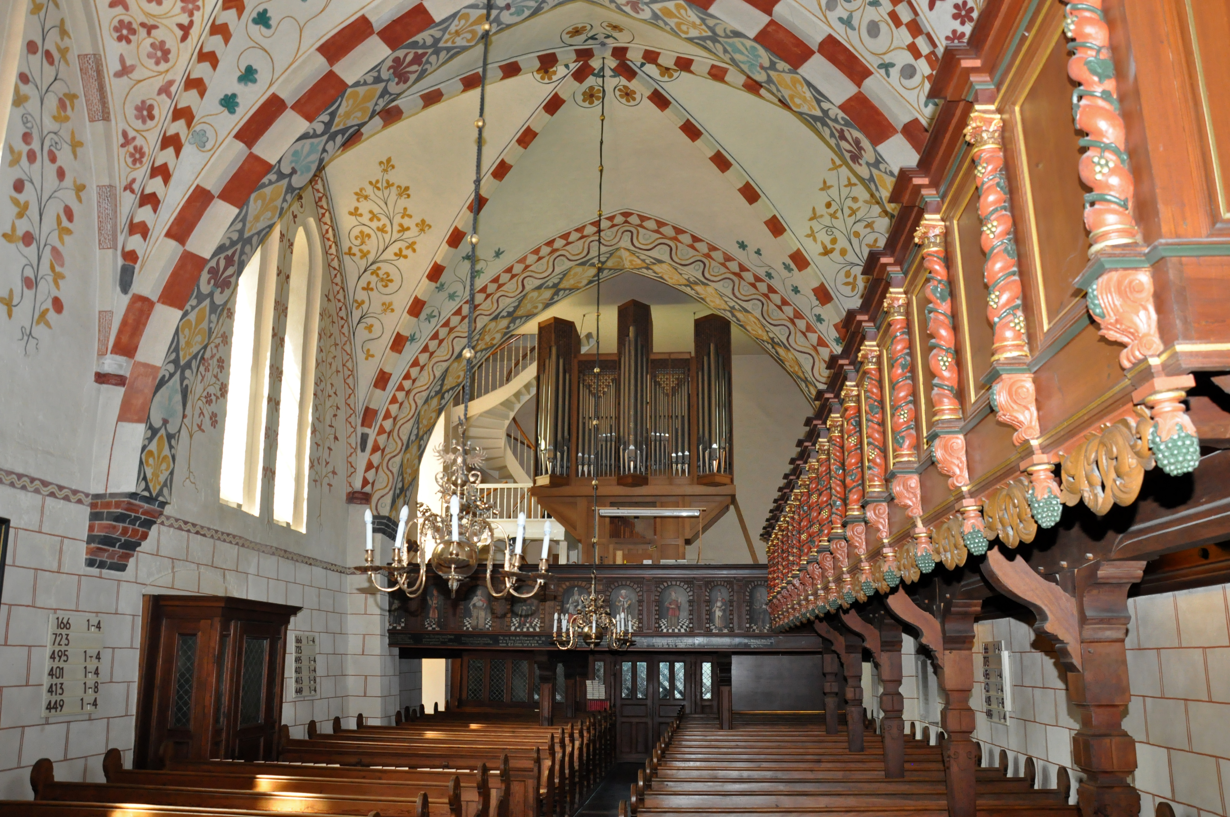 Orgel der Maria-Magdalenen-Kirche, Berkenthin, Schleswig-Holstein, Deutschland